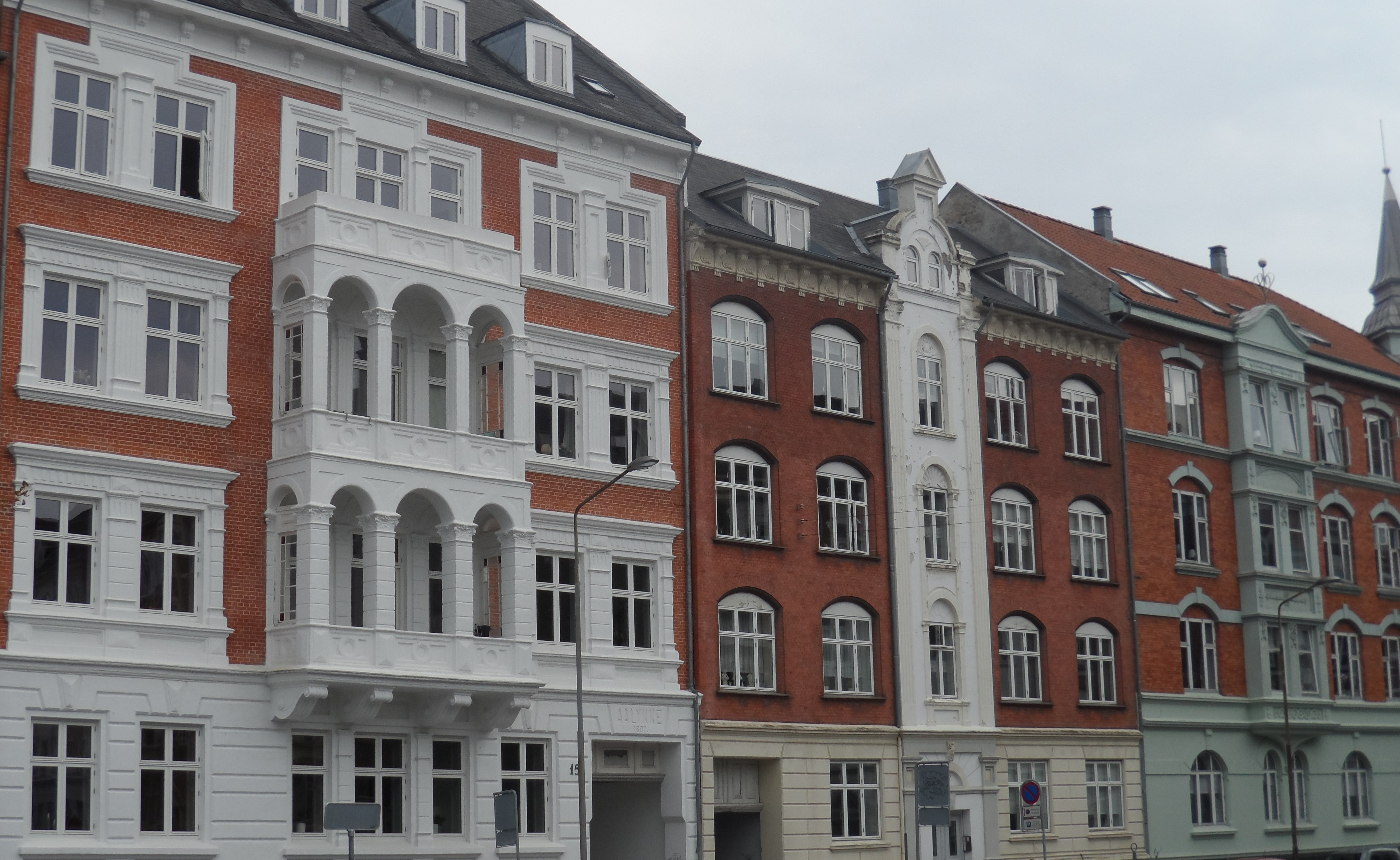 Allborg, Danmark, historicisktiske bygninger, 2014